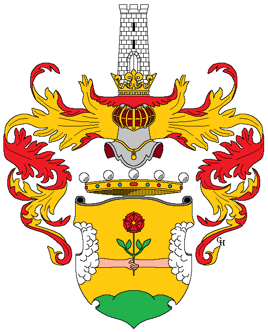 Wappen des k.u.k. Generalmajors Heinrich Hentzi (1785–1849), verliehen anlässlich seiner Erhebung in den österreichischen Adelsstand als "Edler von Arthurm" 1844. Zeichnung von Gerd Hruška ( Für weitere Informationen zu dieser Standeserhebung siehe (